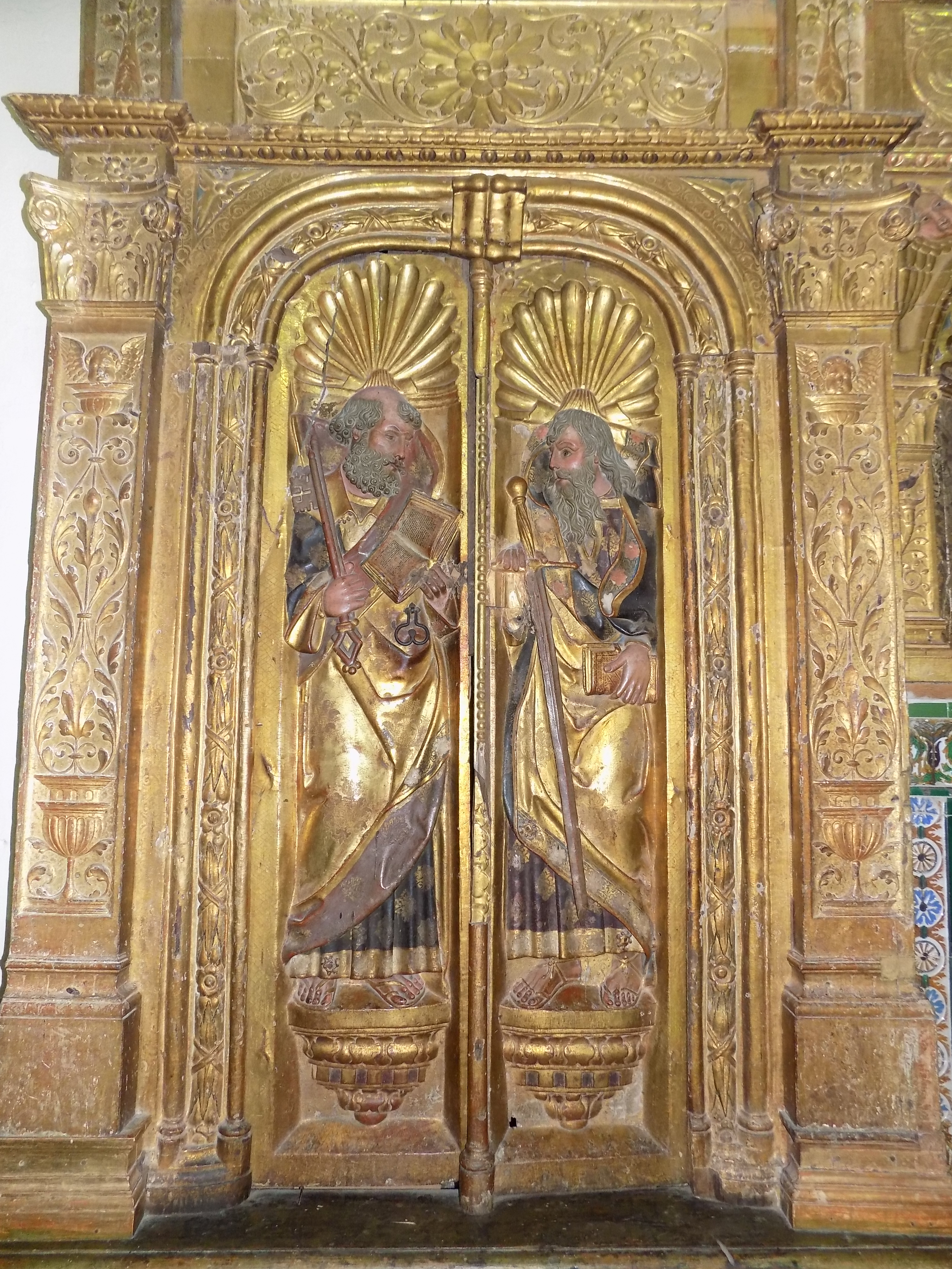 San Pedro y San Pablo. Relieve del retablo mayor de la iglesia de Nuestra Señora del Castillo de Fuente Obejuna, provincia de Córdoba, (España).